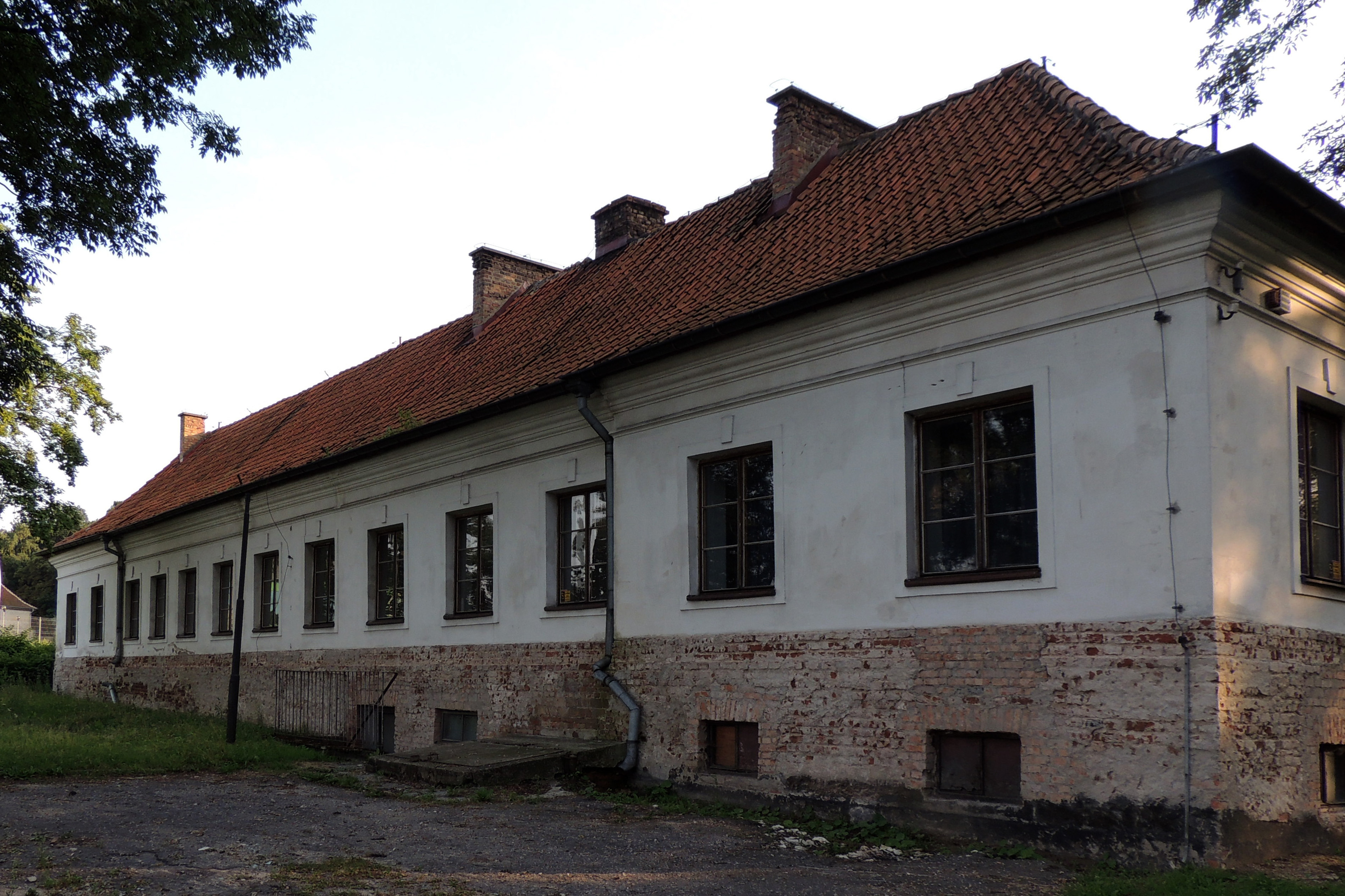 Braniewo, pałac biskupa Potockiego, 1713